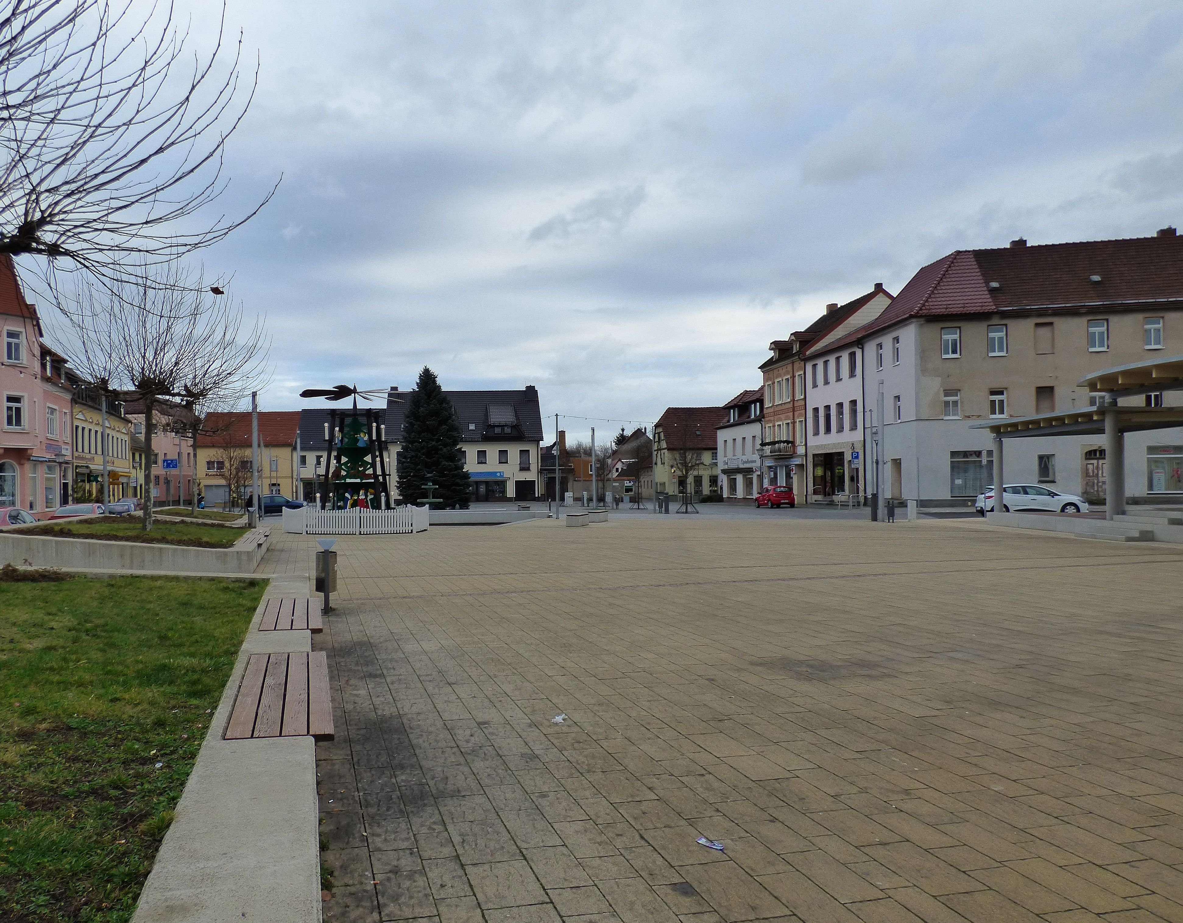 Der umgestaltete Markt in Elsterwerda an Weihnachten 2015.